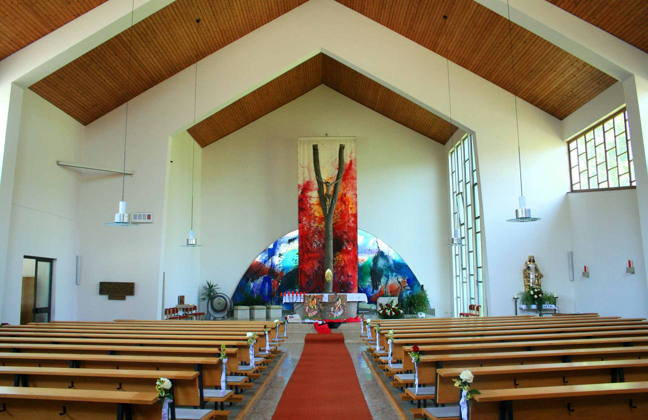 Kath. Pfarrkirche hl. Johannes Capistran